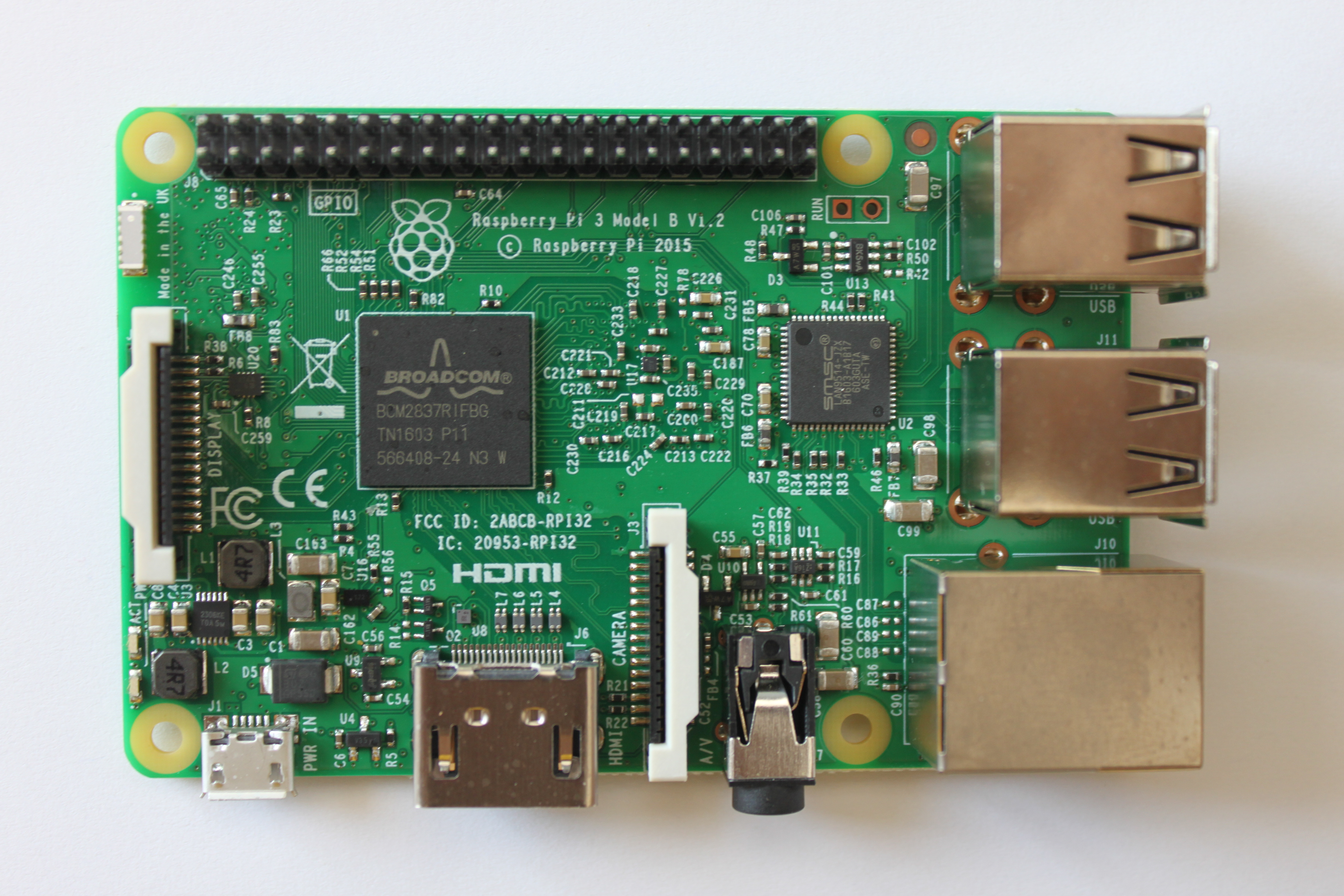 Carte mère du raspberry Pi 3 Modèle B